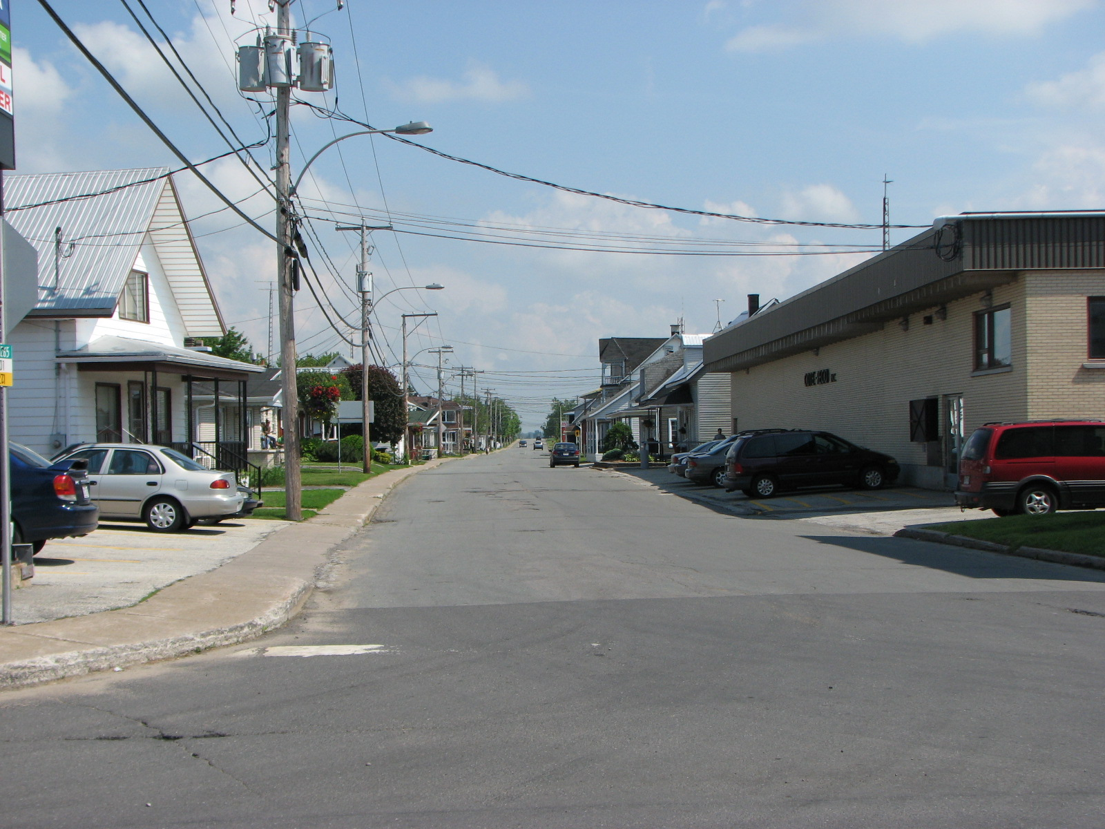 Route 265. De Deschaillons vers Parisville